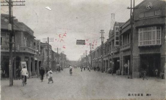 嘉義市大通，今中山路